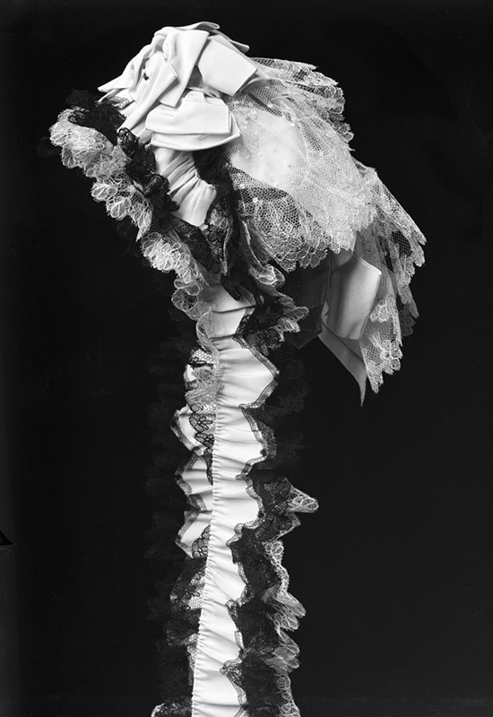 Mössa av spets och tyll med knytband, från 1880-talet. Nordiska museets föremål, inv nr 143750